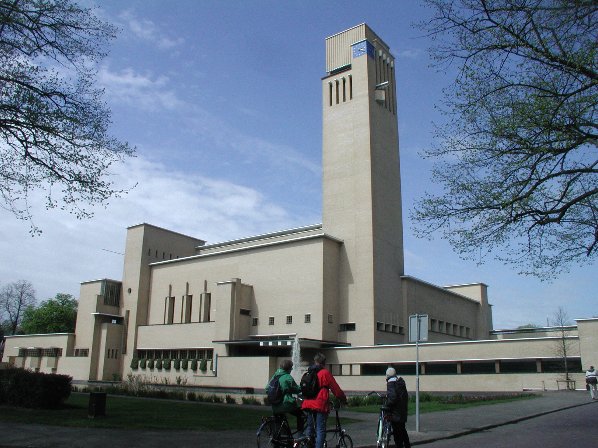 Raadhuis Hilversum